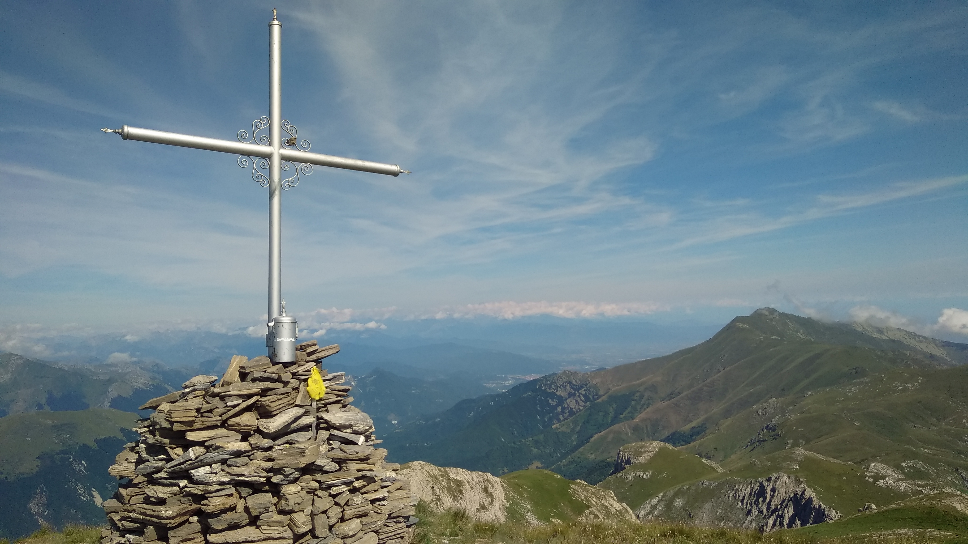 Cima della Fascia (Ligurian Alps, Italy): summit cross, on its right the Bric Costa Rossa